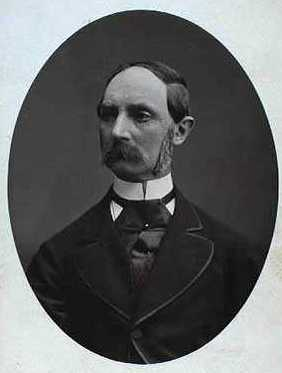 Julius Prinz zu Schleswig-Holstein-Sonderburg-Glücksburg (* 14. Oktober 1824, + 1. Juni 1903), Sohn des Frederik Wilhelm Paul Leopold Herzog zu Schleswig-Holstein-Sonderburg-Glücksburg und der Luise Karoline Prinzessin von Hessen-Kassel, Bruder des Christian IX., König von Dänemark